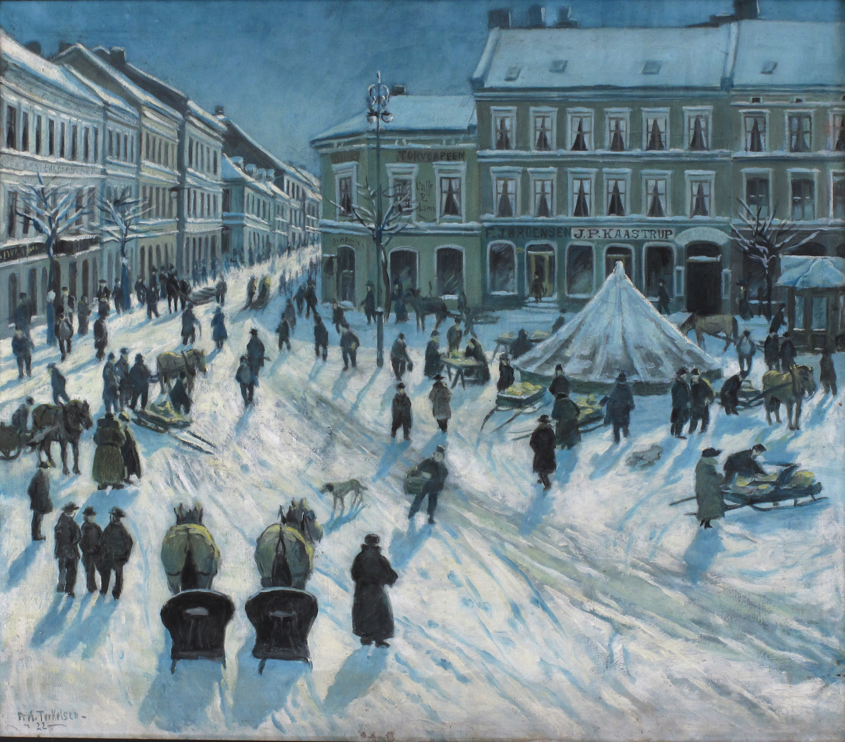 Arendal torv, vinter, sleder og hest. Maleri av Fred Terkelsen, malt 1922.